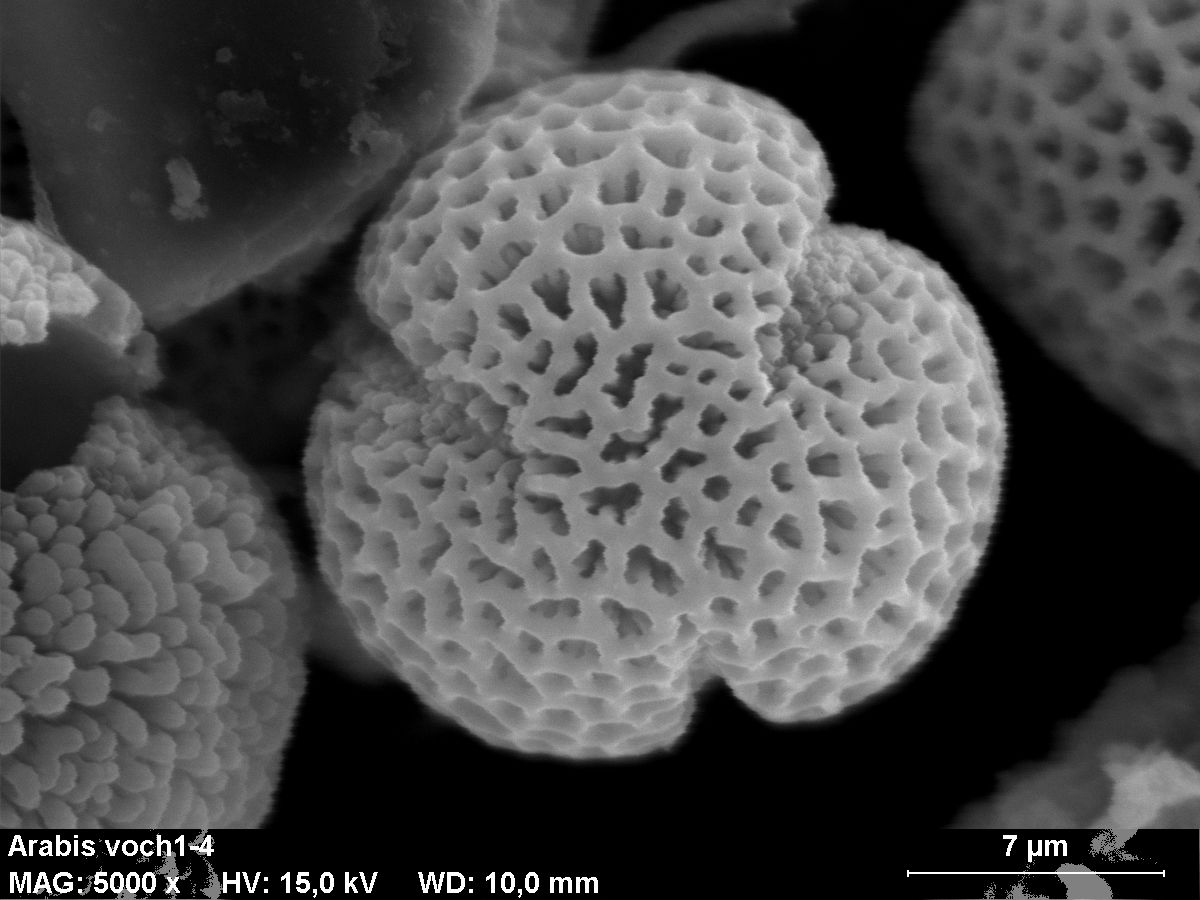 Arabis voch - Pollen (Rasterelektronenmikroskop)